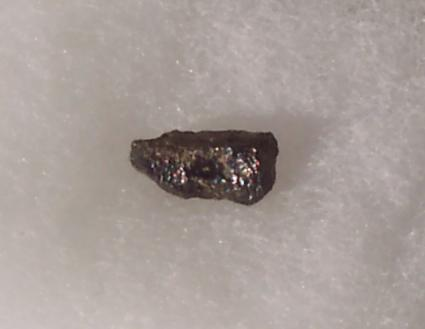 Carbonado sample